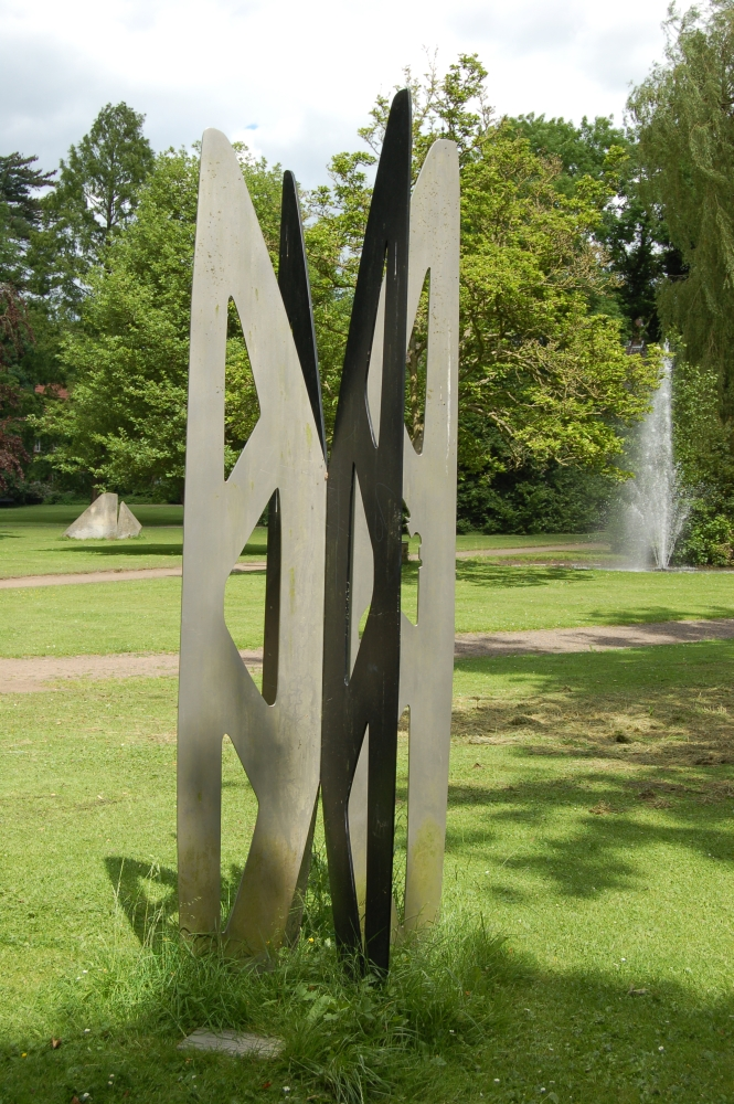 Time Wiper